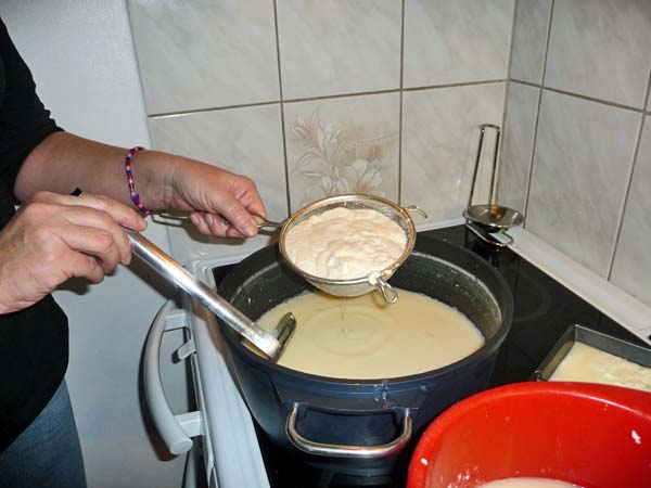 Först får vätskan sjuda upp